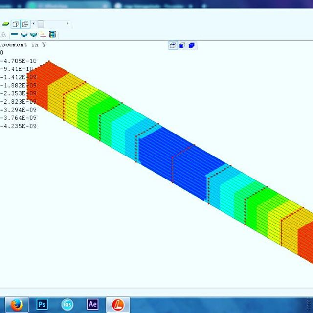 A simulação computacional é amplamente utilizada nas empresas para realizar análises e melhorar a qualidade dos produtos e projetos. Grande parte dessas análises é realizada por meio de softwares que utilizam o Método dos Elementos Finitos, os quais possibilitam a obtenção de respostas para inúmeros problemas de engenharia.